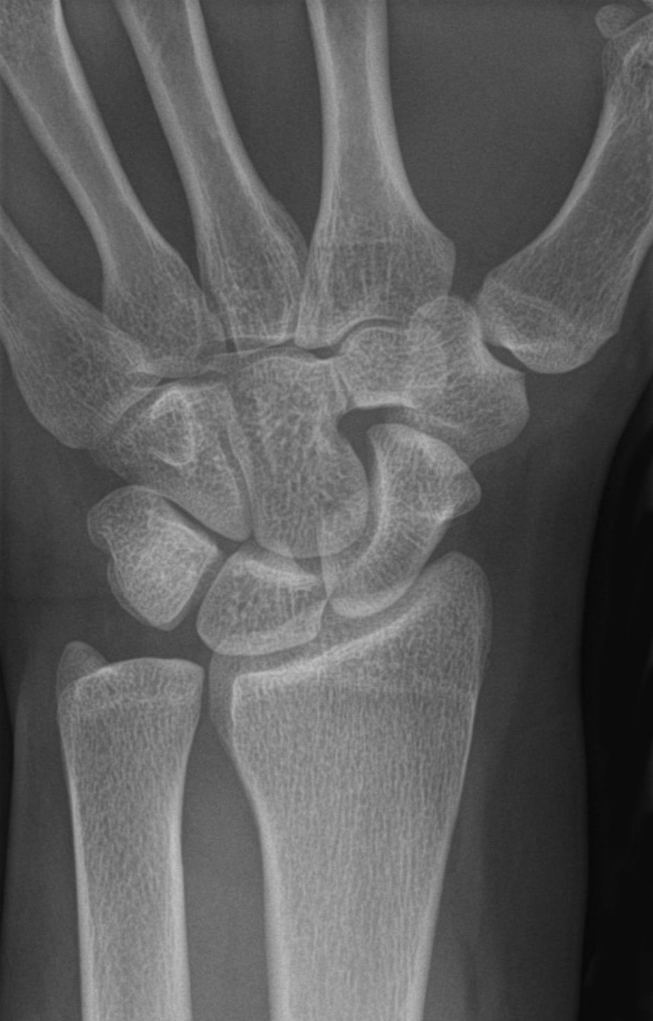 Karpale Koalition: Hier seltener Fall einer Fusion von Os capitatum und Os trapezoideum. Ob die Fusion komplett knöchern ist, kann anhand dieser einen Aufnahme nicht sicher entschieden werden. Zufallsbefund bei Frakturausschluss.